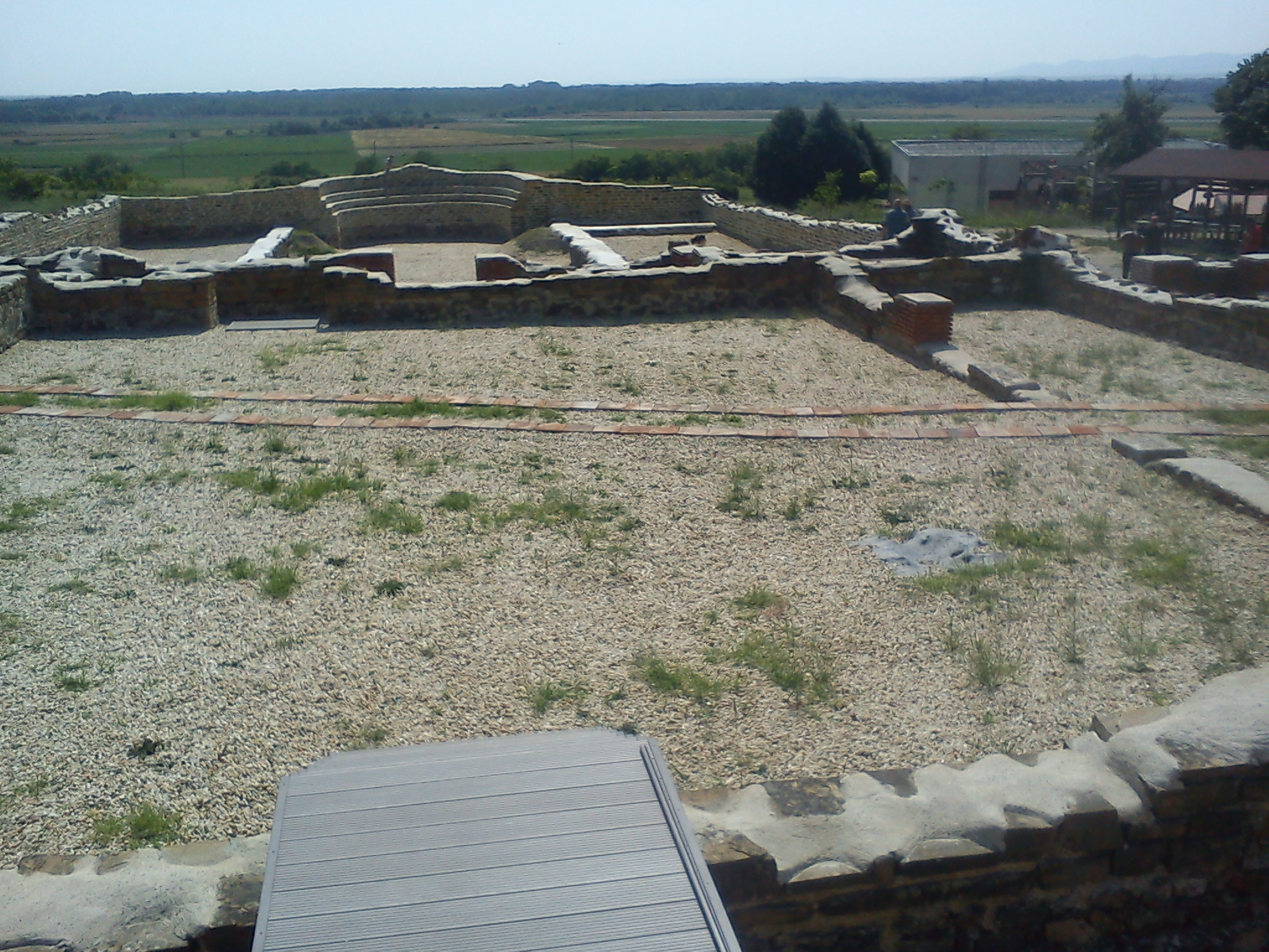 Кабиле